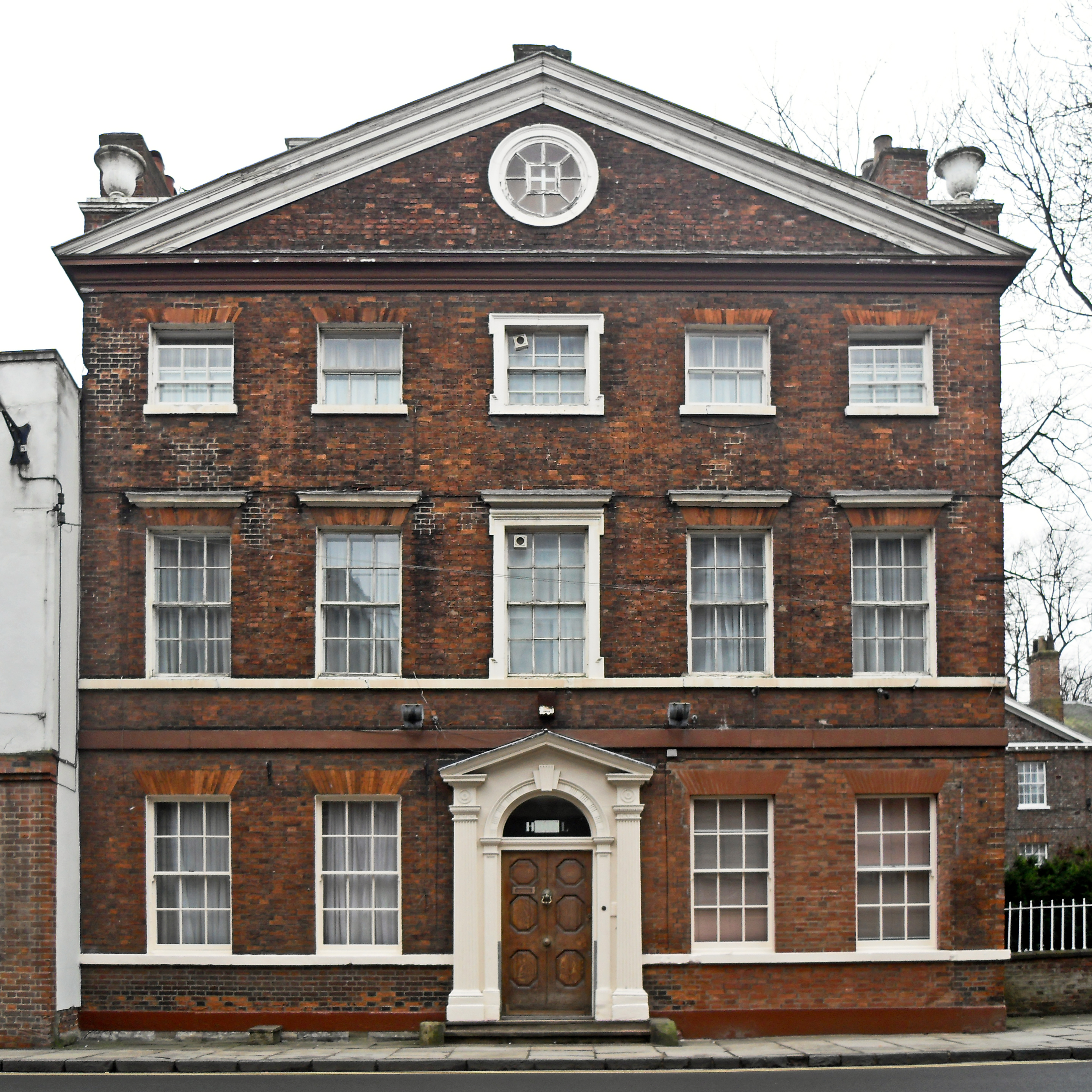 House in Skeldergate, York